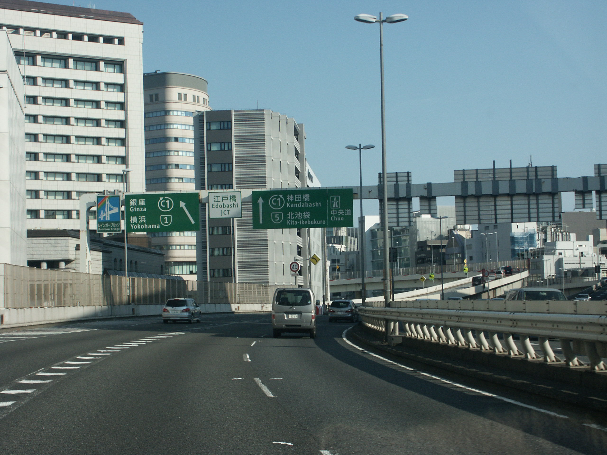 首都高速6号向島線江戸橋ジャンクション上り分岐付近